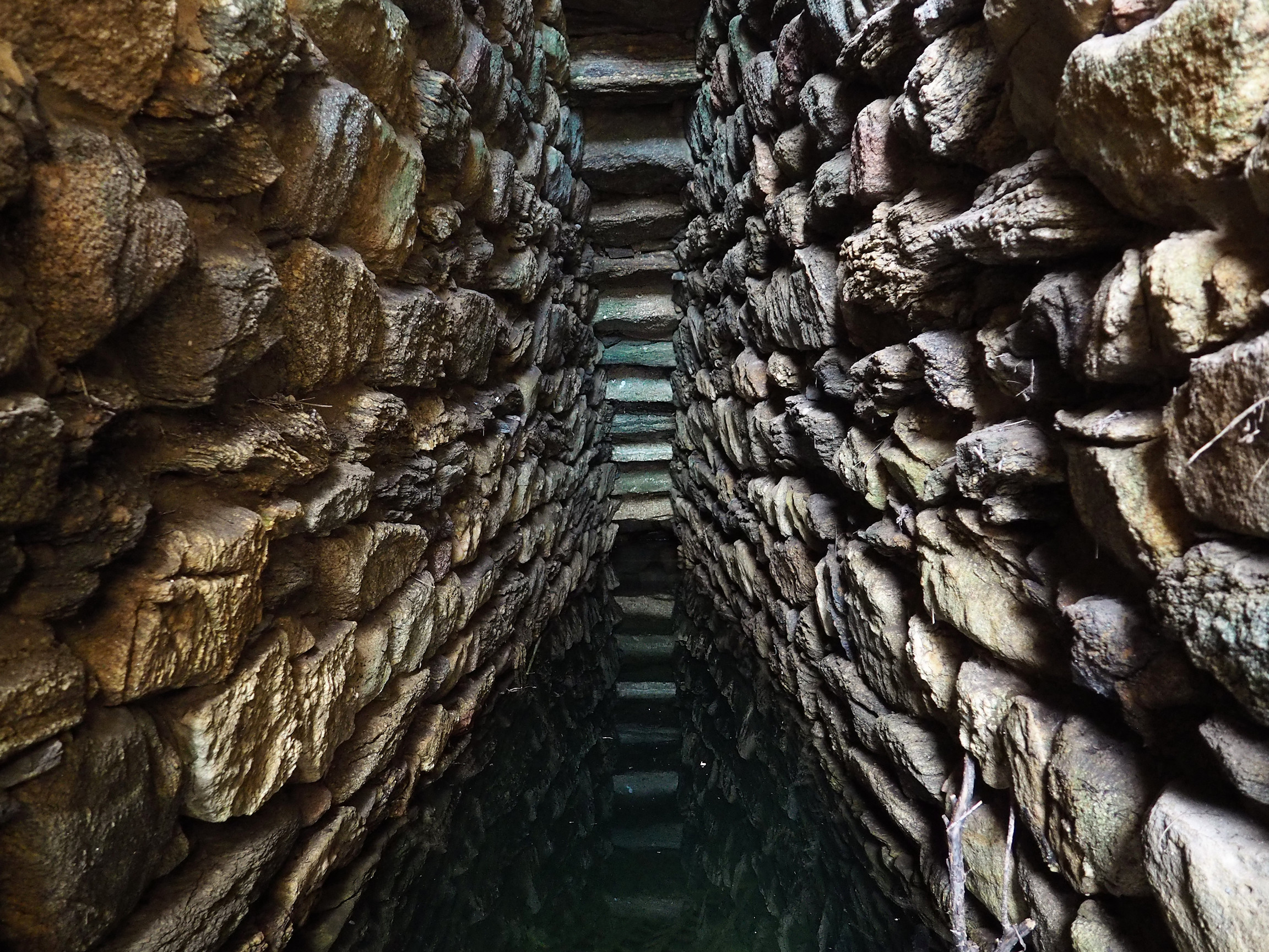 La struttura interna del Pozzo Sacro Nuragico di Milis a Golfo Aranci